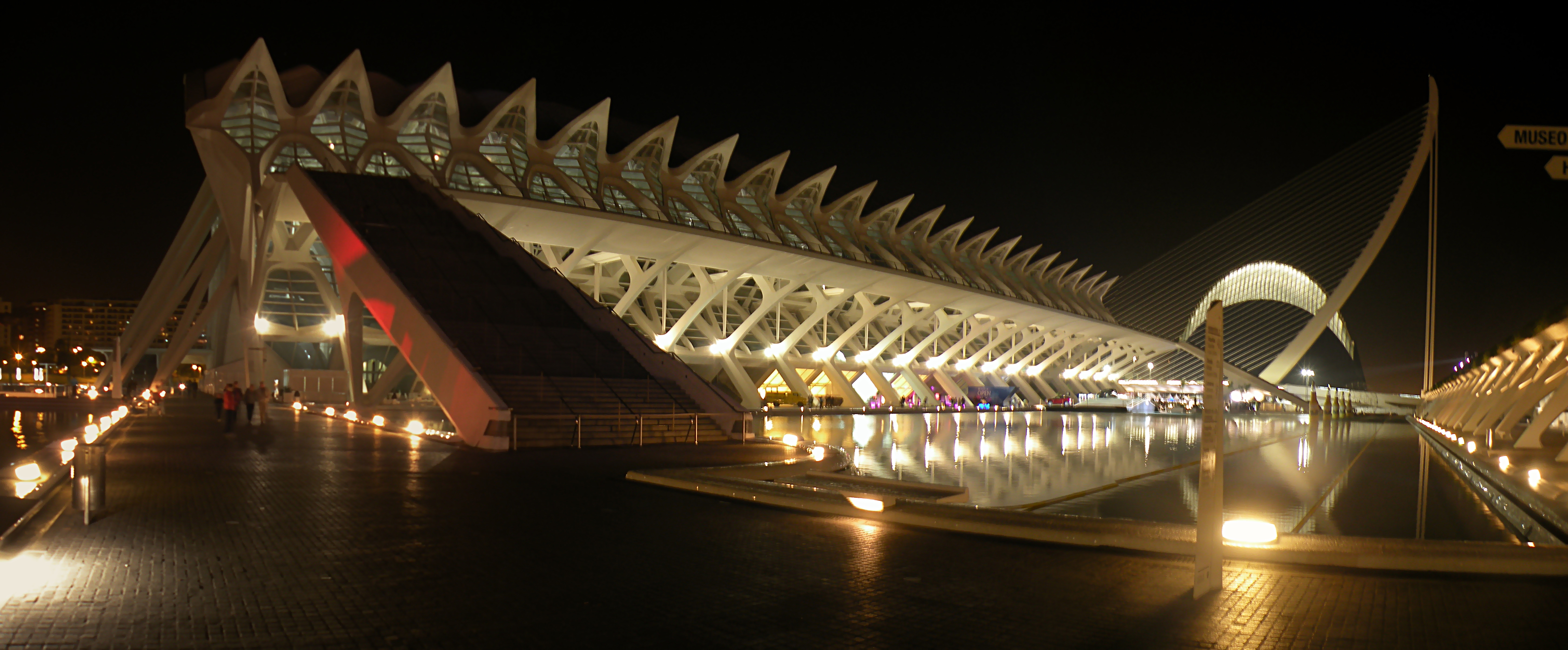 El Museu de les Ciencies Principe Felipe.Valencia.